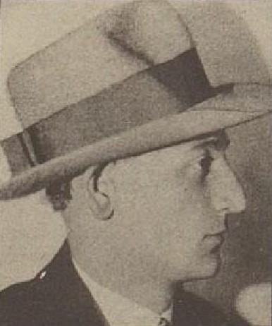 Bohuš Hradil (1905-1984), český herec